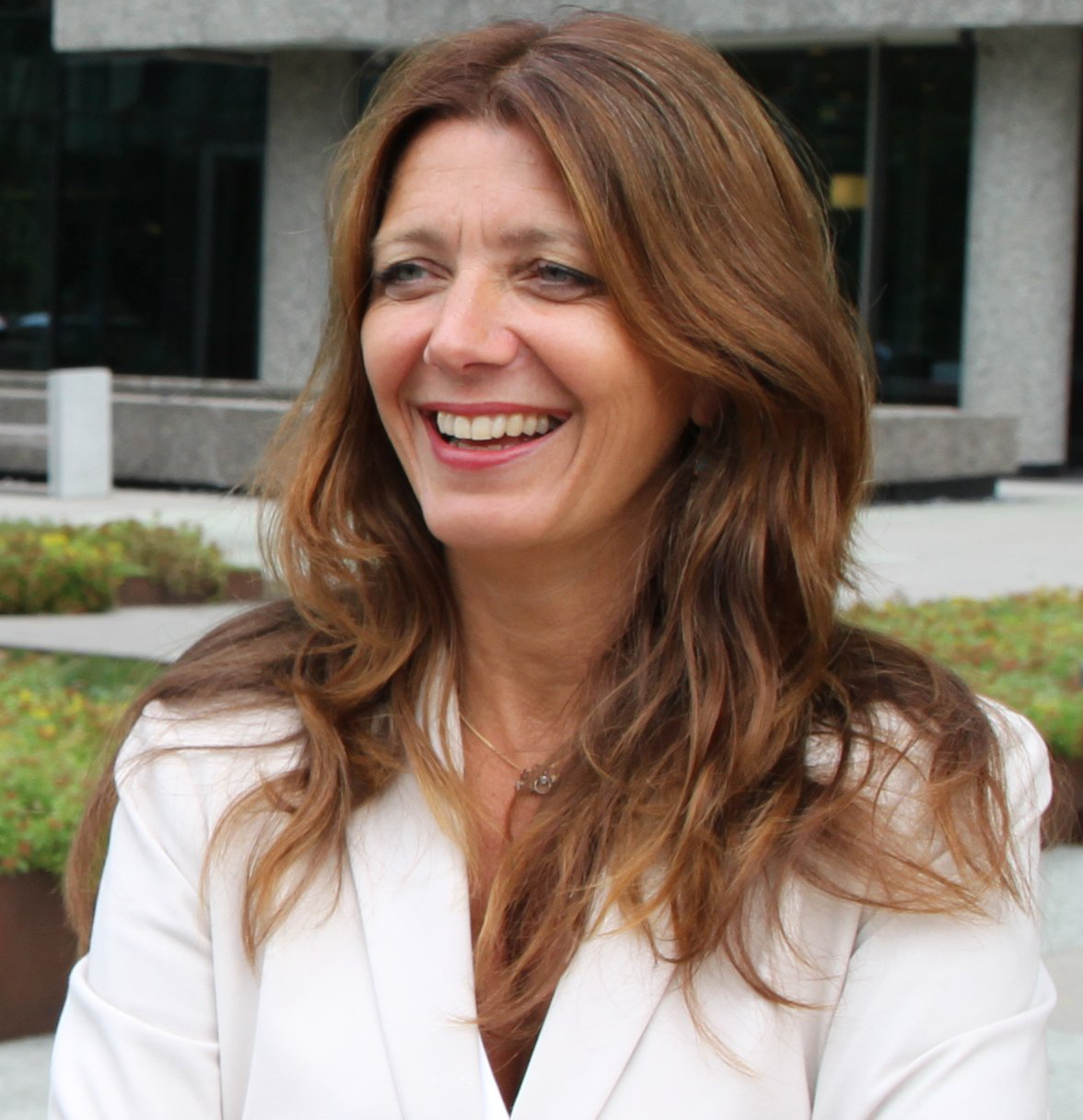 Anne-Cecilie Kaltenborn, adm.dir. NHO Service og Handel